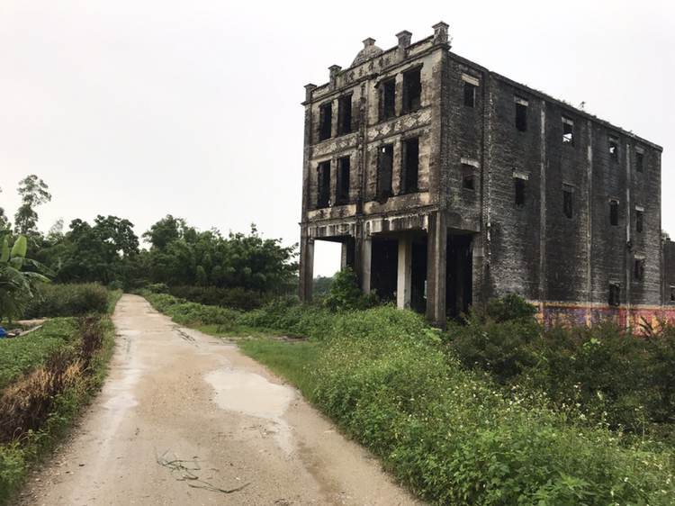 中文（香港）: 新寧鐵路五十車站附屬建築物與路基遺址